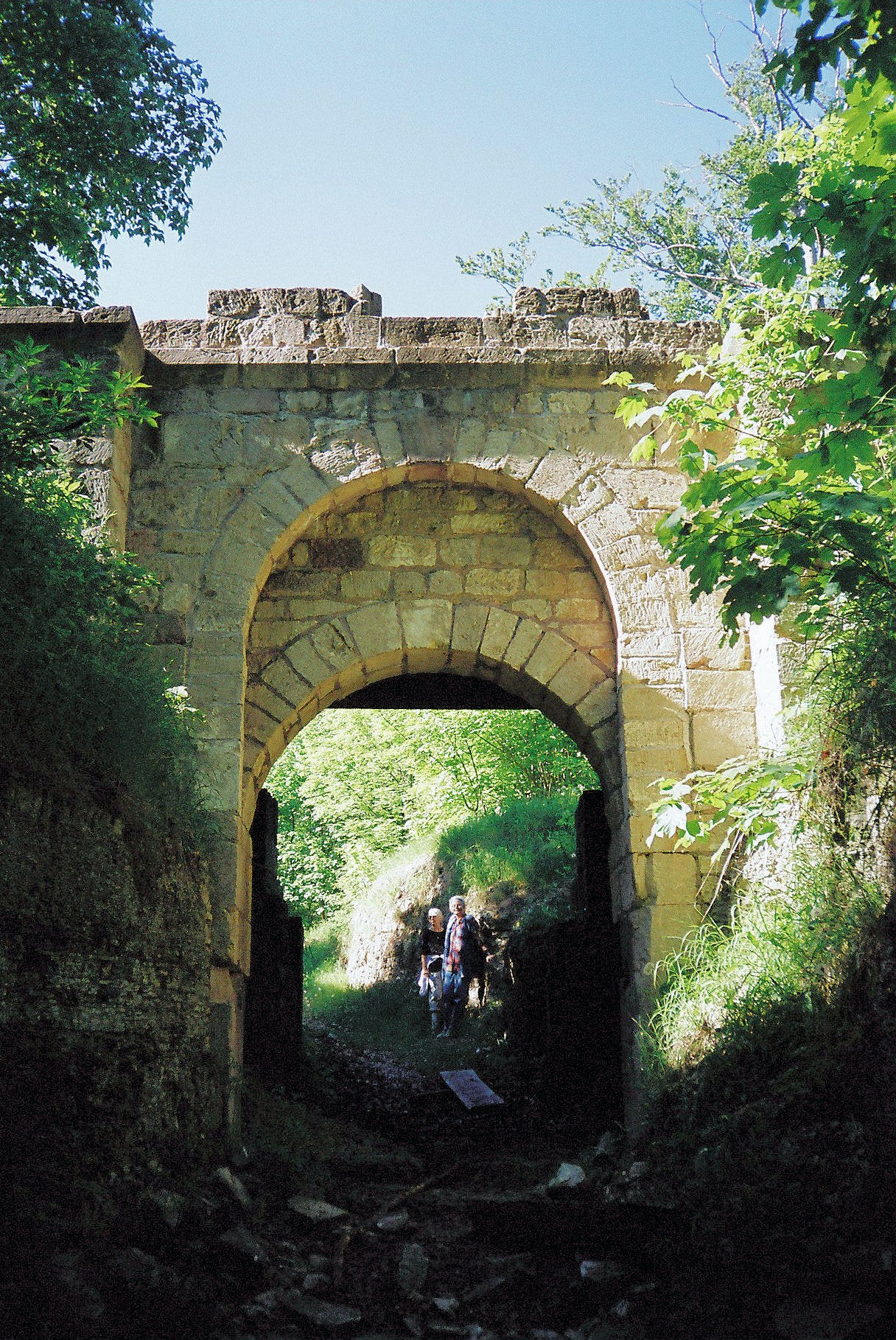 Burgtor der Hasenburg (2000)